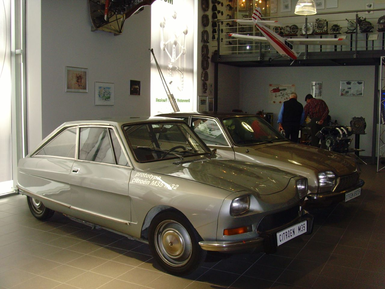 Museum AUTOVISION Tradition & Forum, Altlußheim